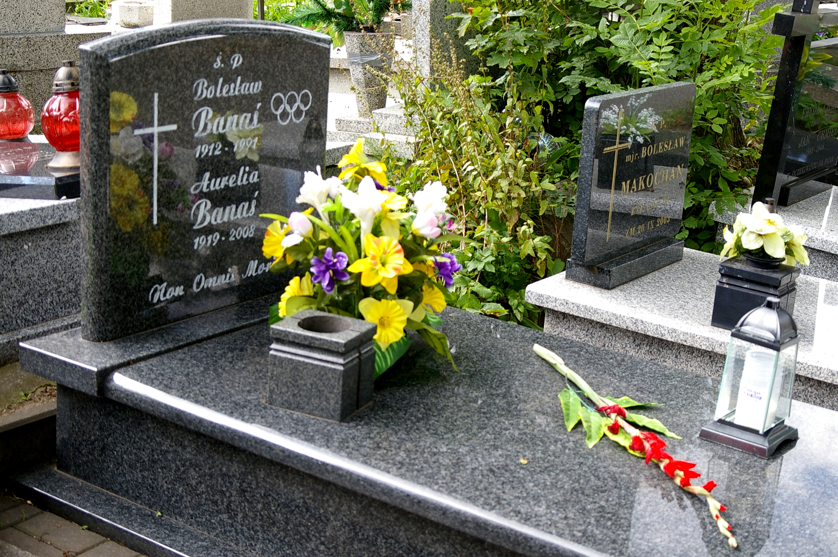 Grób Aurelii i Bolesława Banasiów na Starym Cmentarzu w Łodzi